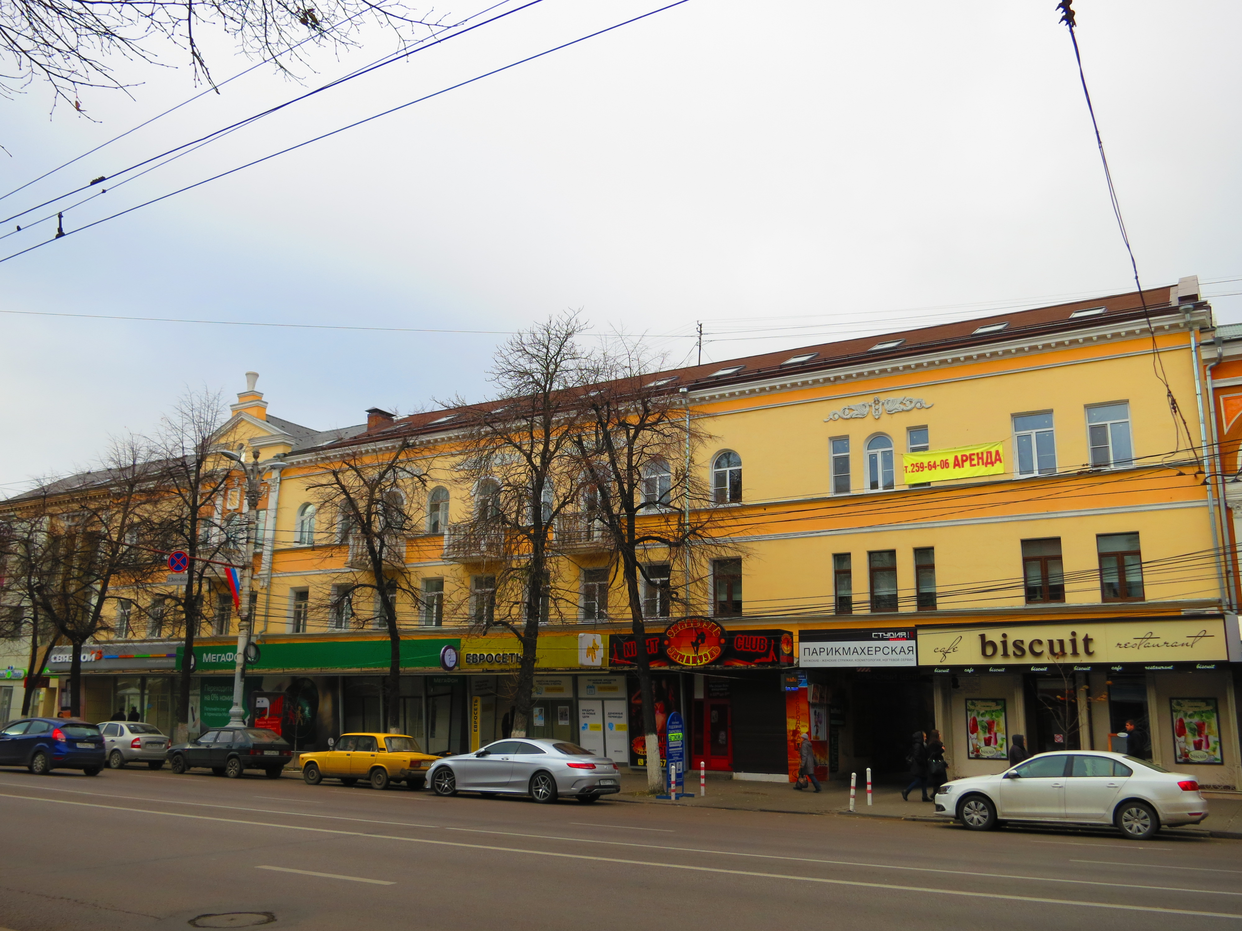 Дом, где жил писатель А. И. Шубин: проспект Революции, 48, Воронеж, Воронежская область